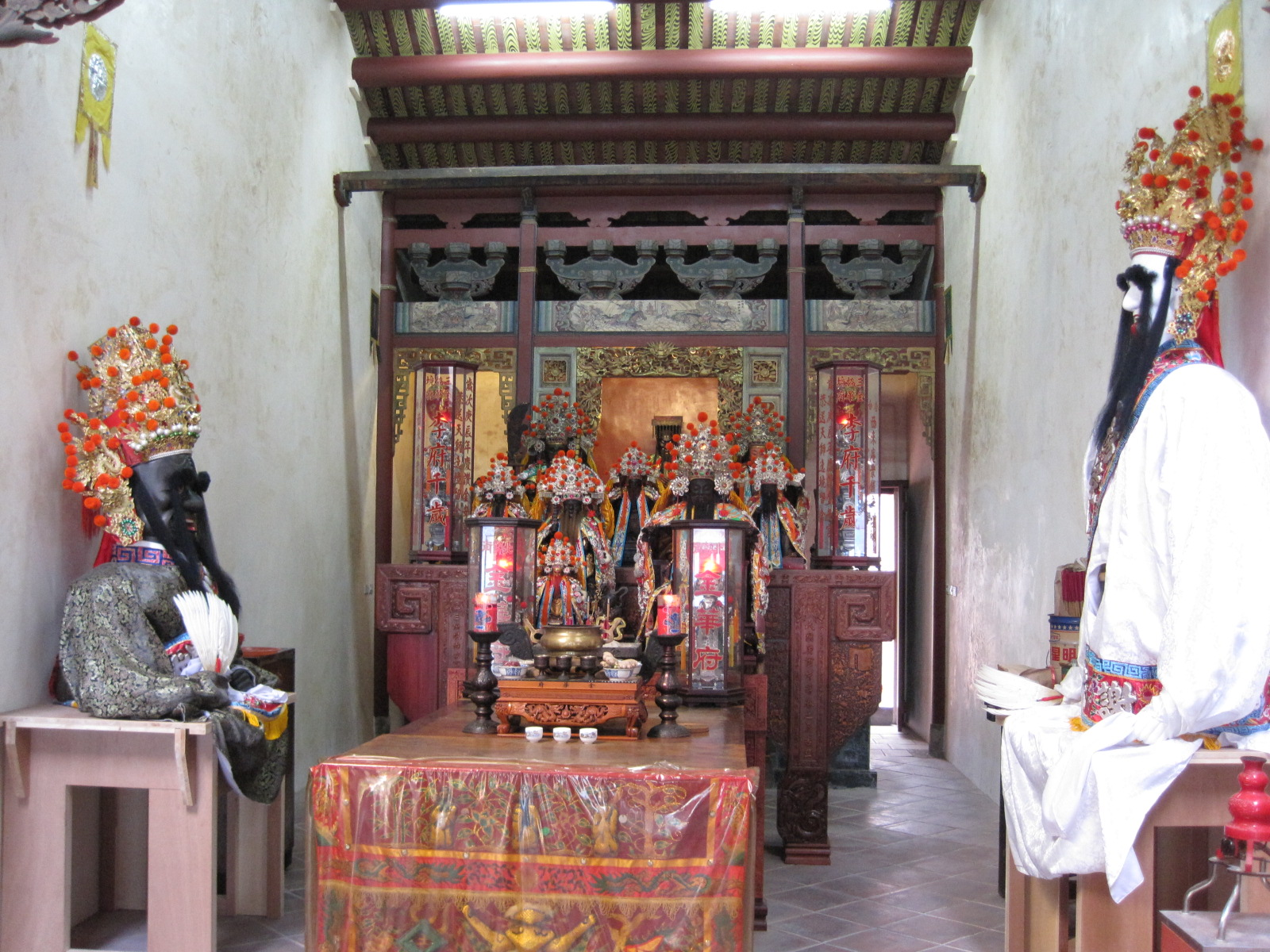 臺南市金華府正殿